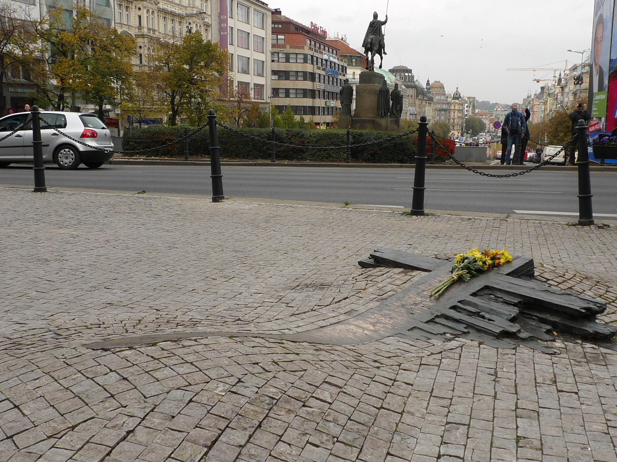 Mahnmal für Jan Palach and Jan Zajic am Wenzelsplatz in Prag